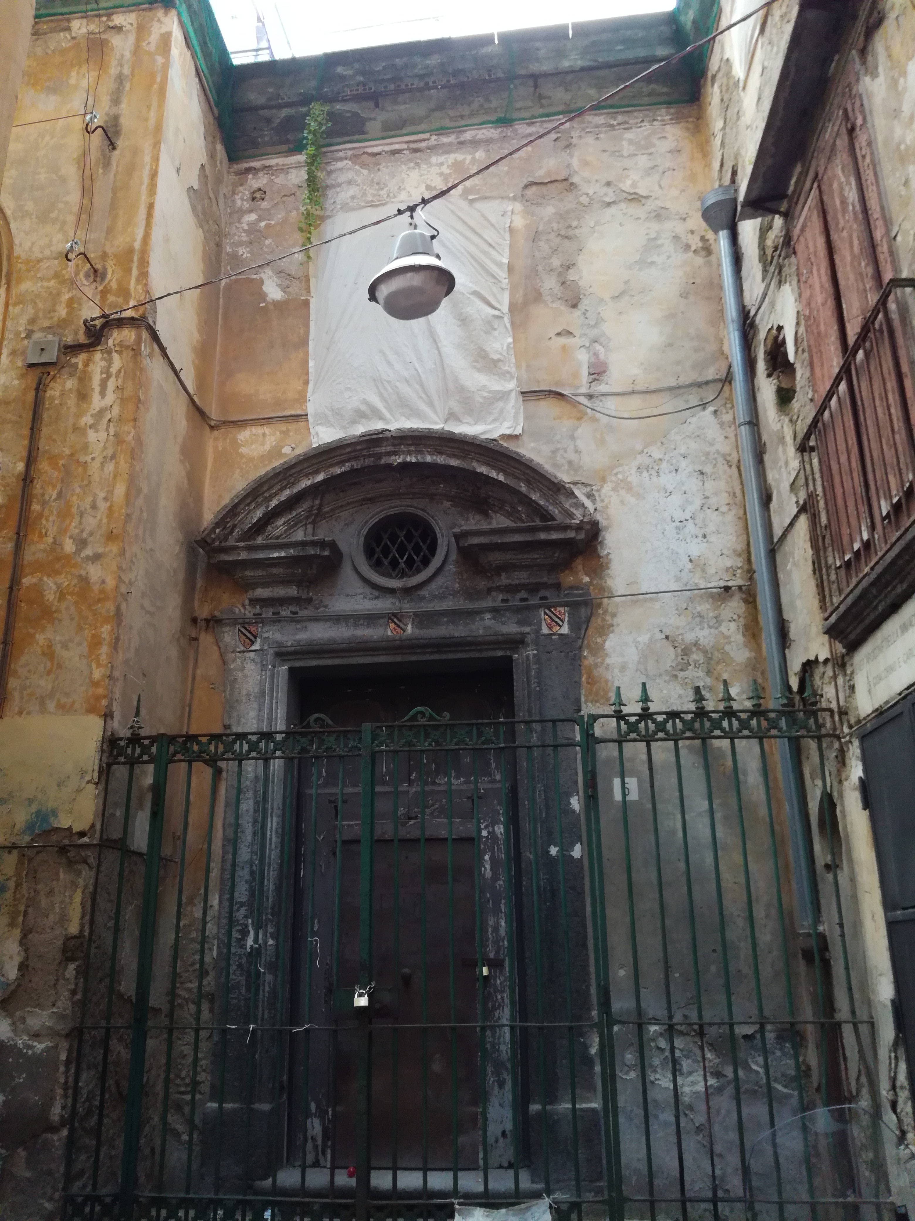 Ingresso principale chiesa di Santa Luciella (Napoli)